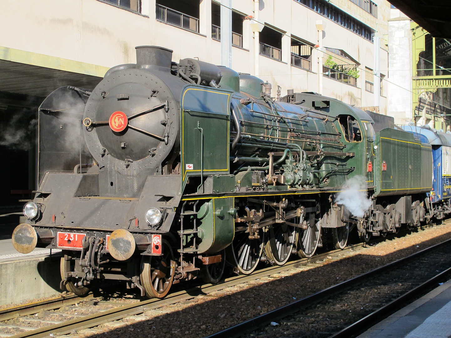 La 231 K 8 en gare de Paris-Lyon le 15 septembre 2013.